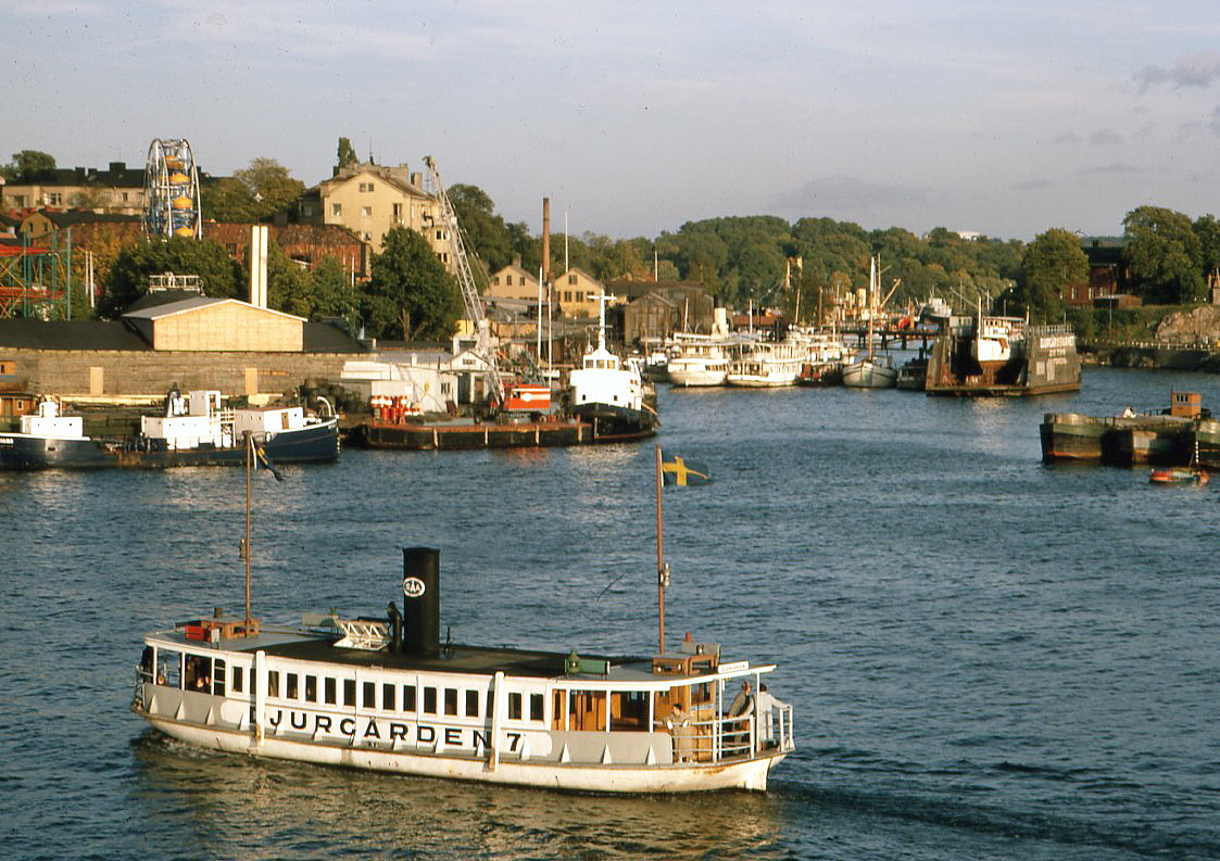 Djurgårdsfärjan. Gröna lund i bakgrunden - Djurgården 7